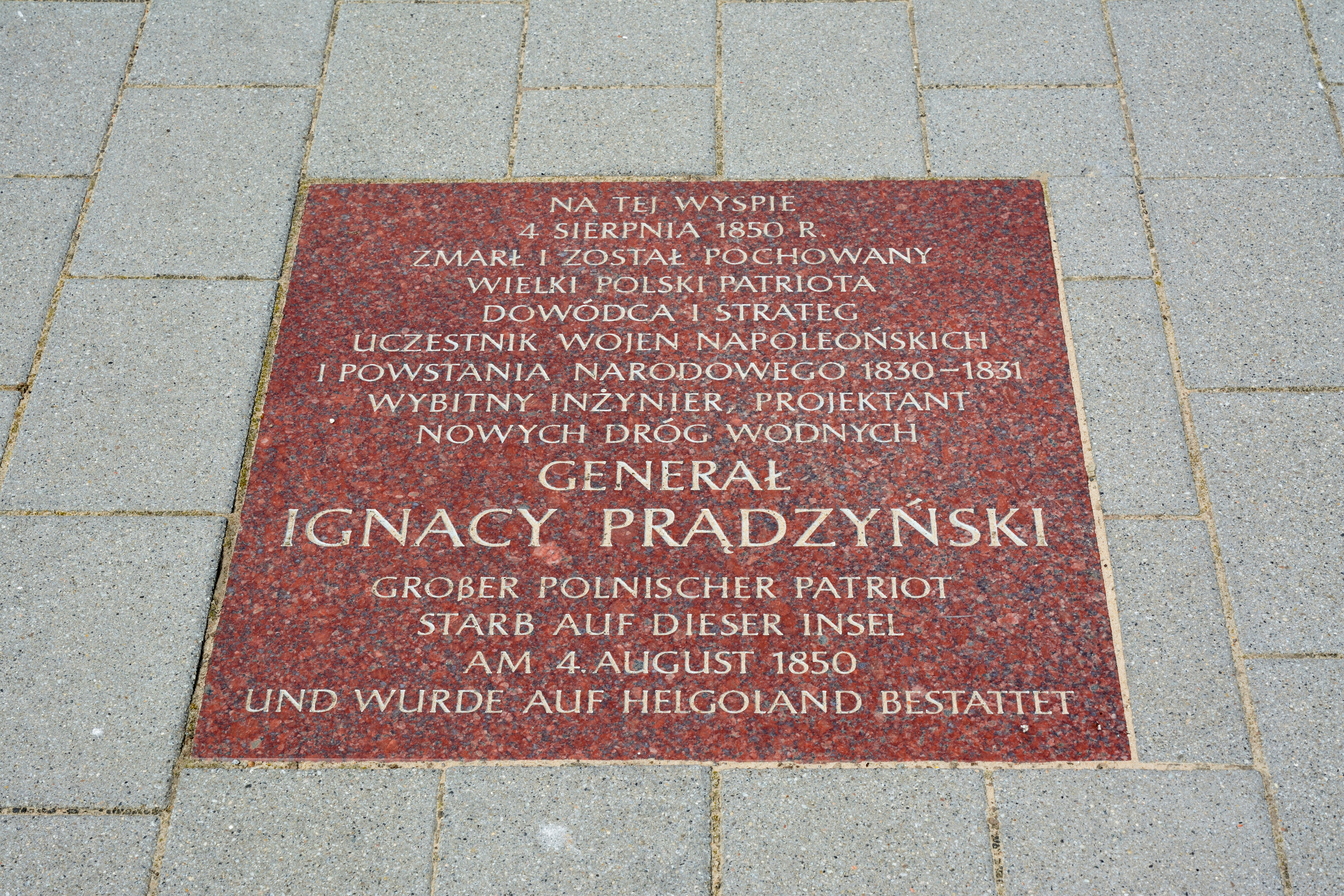 Bilder von Helgoland im Juli 2019Gedenkplatte für Ignacy Prądzyński auf dem Nordseeplatz